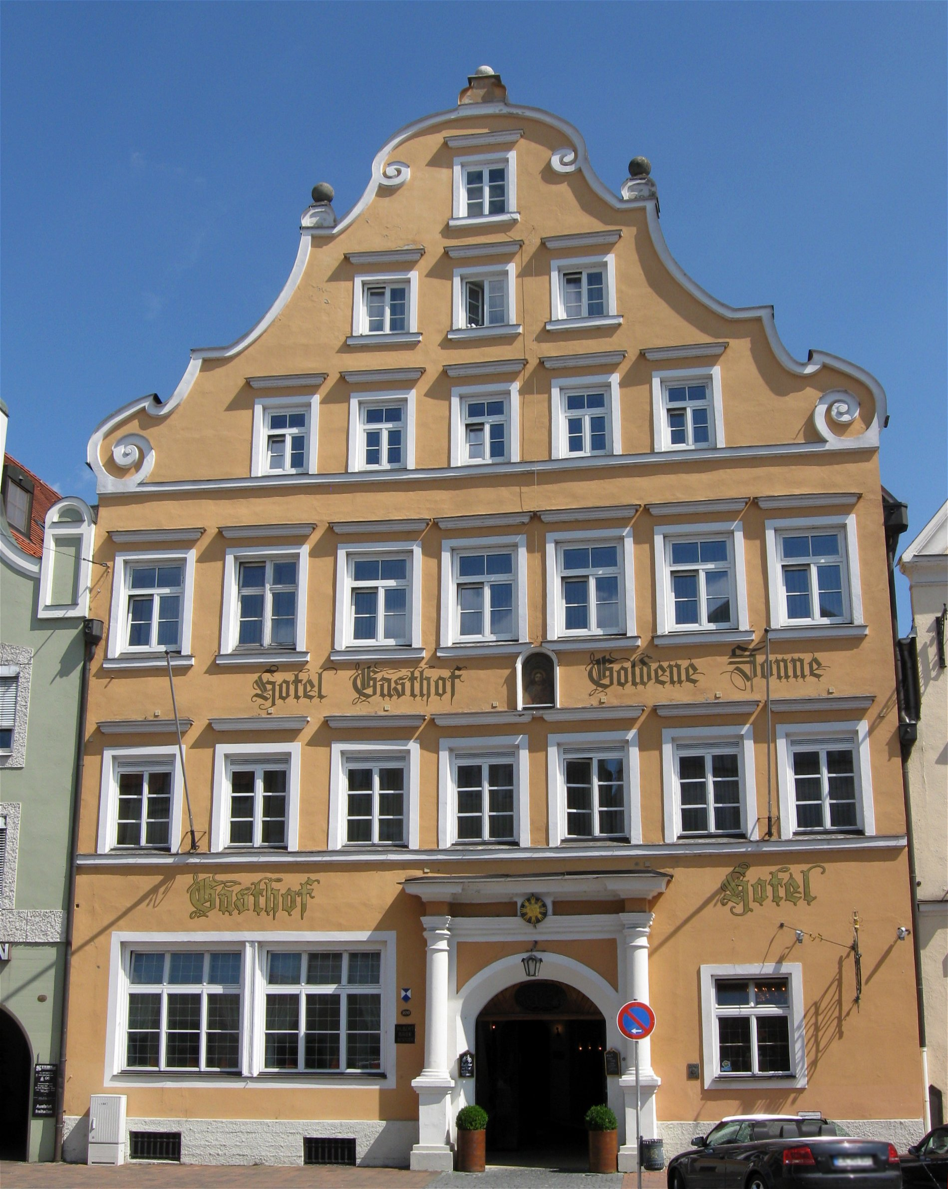 Neustadt 520; Ehem. Palais Pfetten, seit 1802 Gaststätte Goldene Sonne, stattliches dreigeschossiges Giebelhaus zu sieben Achsen, geschweifter Knickgiebel mit angesetzten Voluten, im Kern noch um 1700, bauliche Veränderungen 1876/81